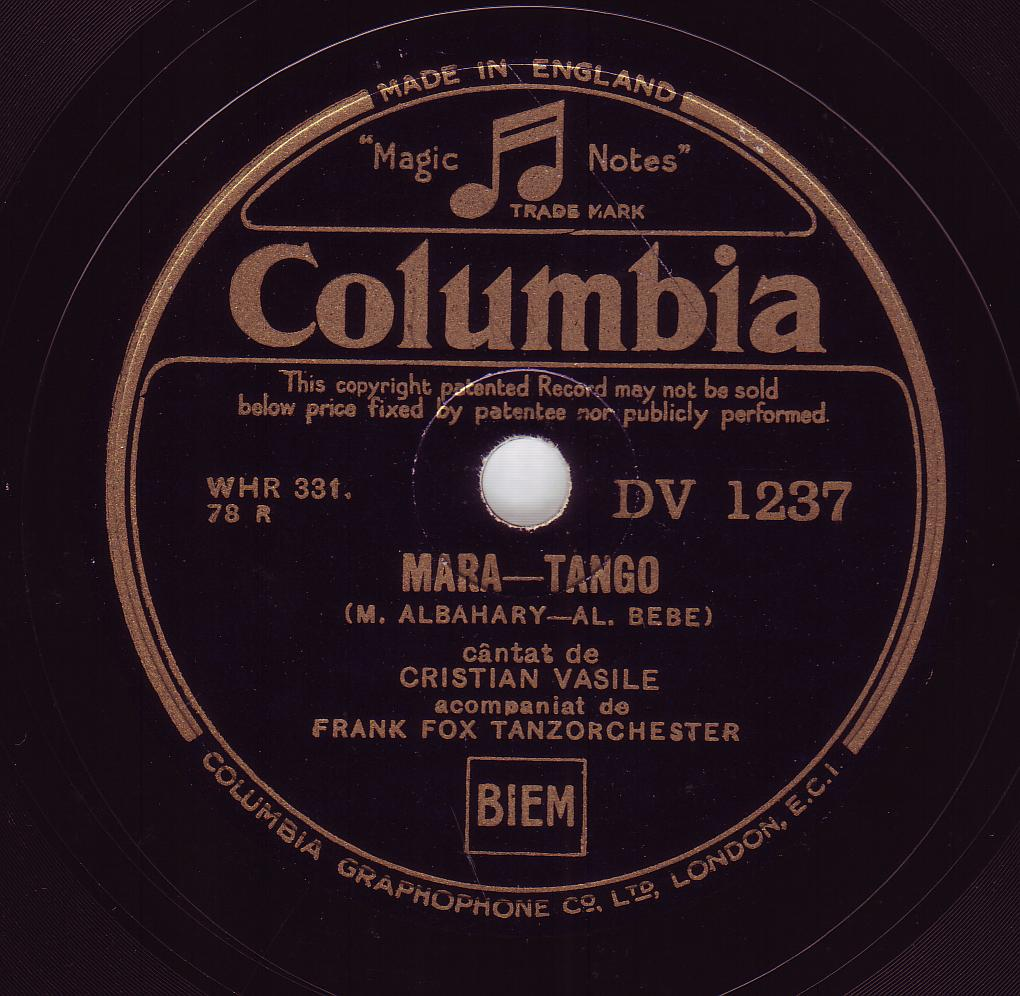 Discu Columbia cu melodia "Mara" inregistrat in 1933